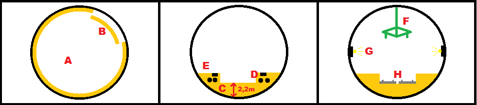 Fases de construcció del túnel Sants-La Sagrera